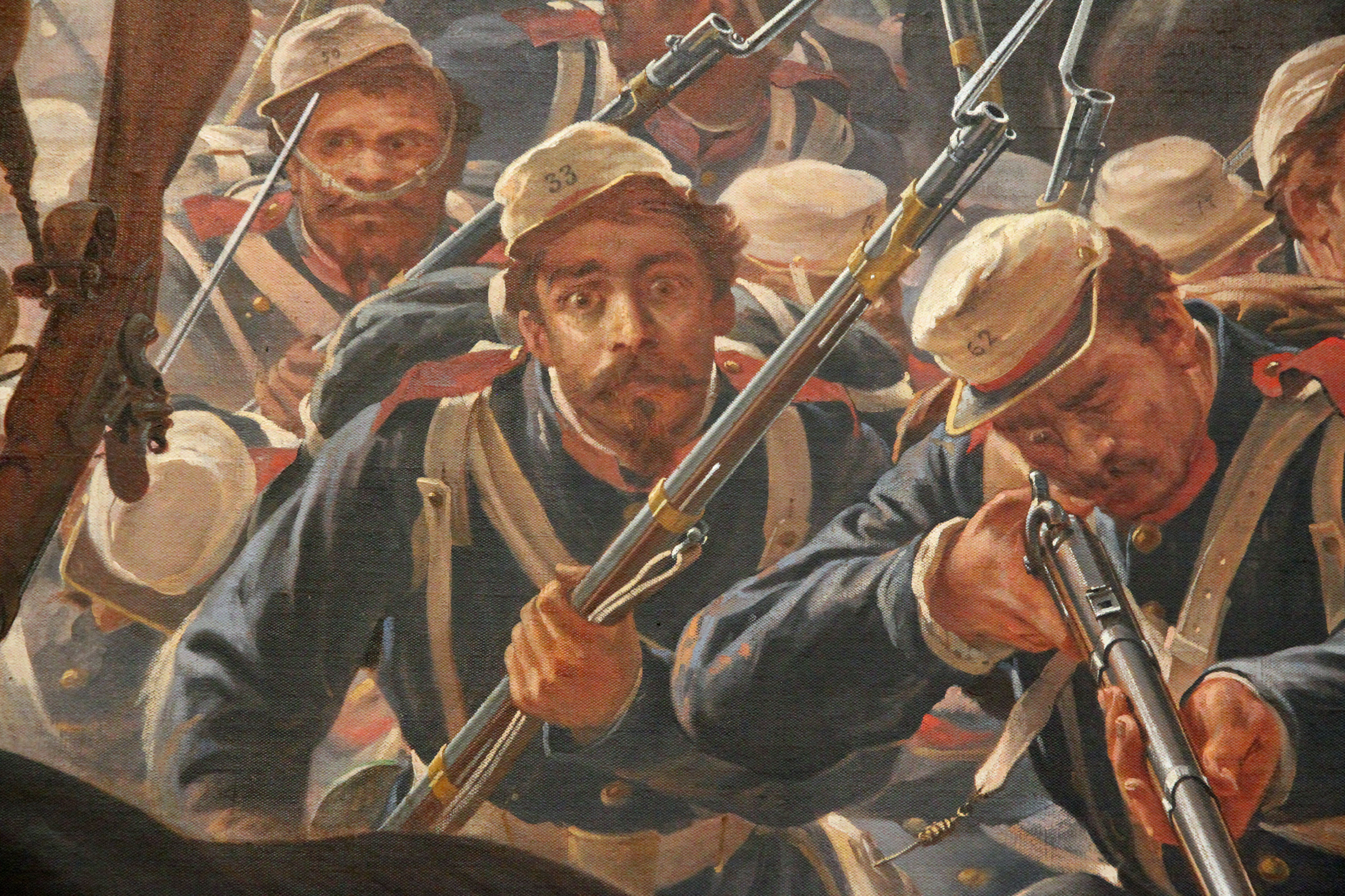 Museu Nacional de Belas Artes - Rio de Janeiro - Pedro Américo - Autorretrato de Pedro Américo na pintura Batalha do Avaí (soldado com número 33 no quepe) - 1877 - Florença - Itália